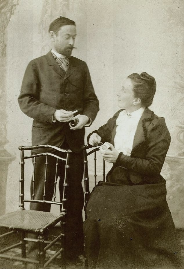 Елена Борисовна Гончарова, ур. Мещерская (1864—1926) с мужем Николаем Ивановичем Гончаровым (1861—1902)